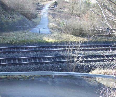 Bahnhof Ehlheim